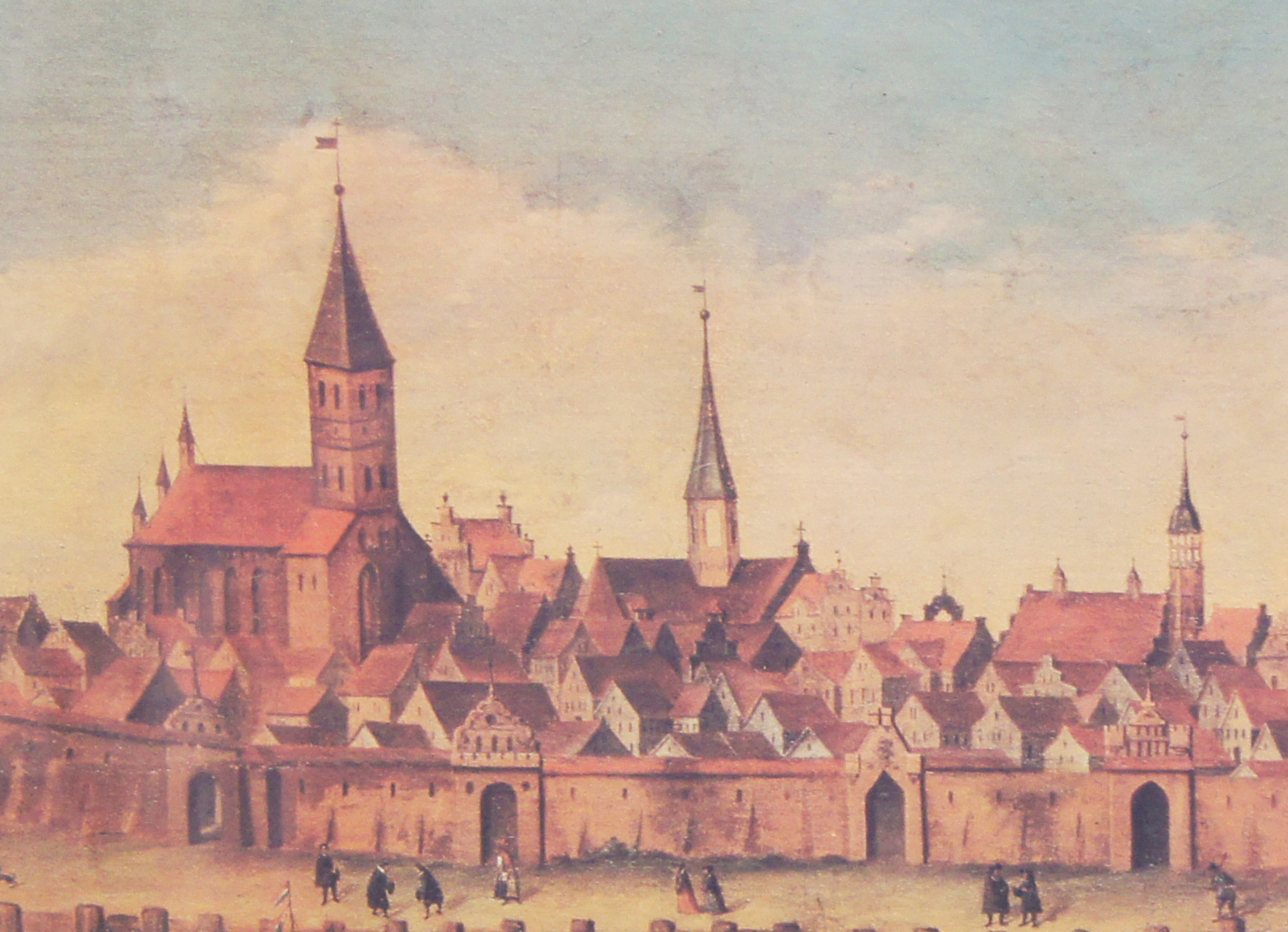 Ausschnitt aus der Ansicht von Greifswald 1552 von Gottlieb Giese. Der Turm der Frabziskanerkirche ist in der Mitte zu sehen, links befindet sich die Marienkirche, rechts der Dachturm des Rathauses.